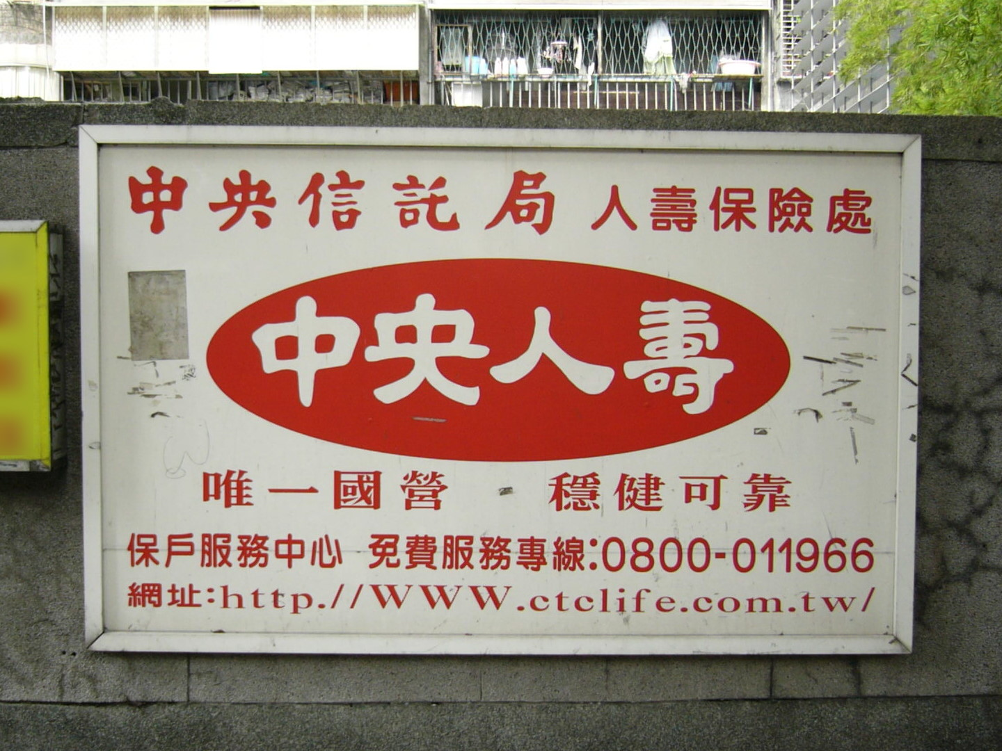 中文（台灣）: 中央信託局人壽保險處「中央人壽」（現為臺灣金控之臺銀人壽）廣告牌，2013年10月時已被完全塗白。